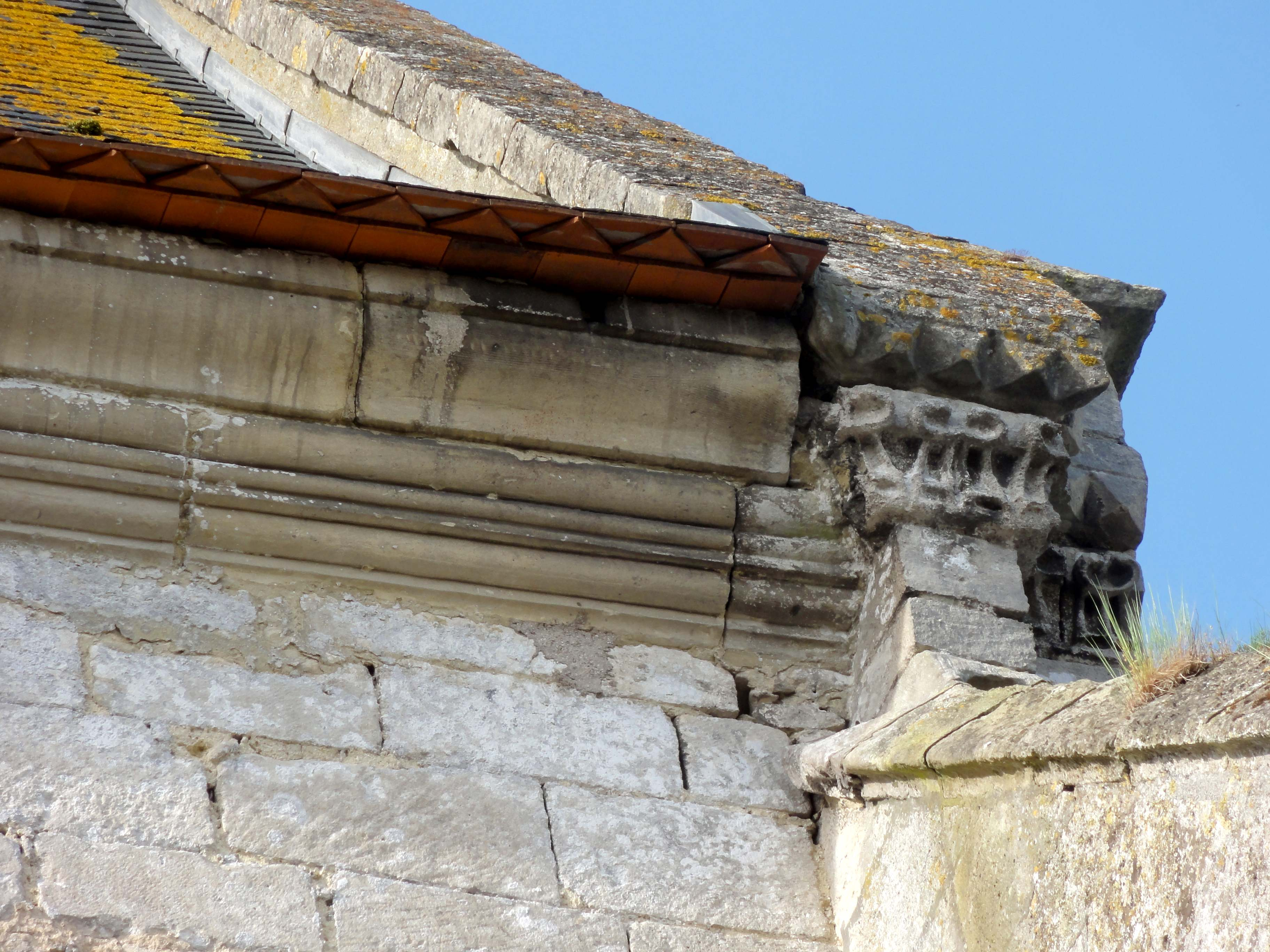 Église Saint-Martin de Cires-lès-Mello (voir titre).